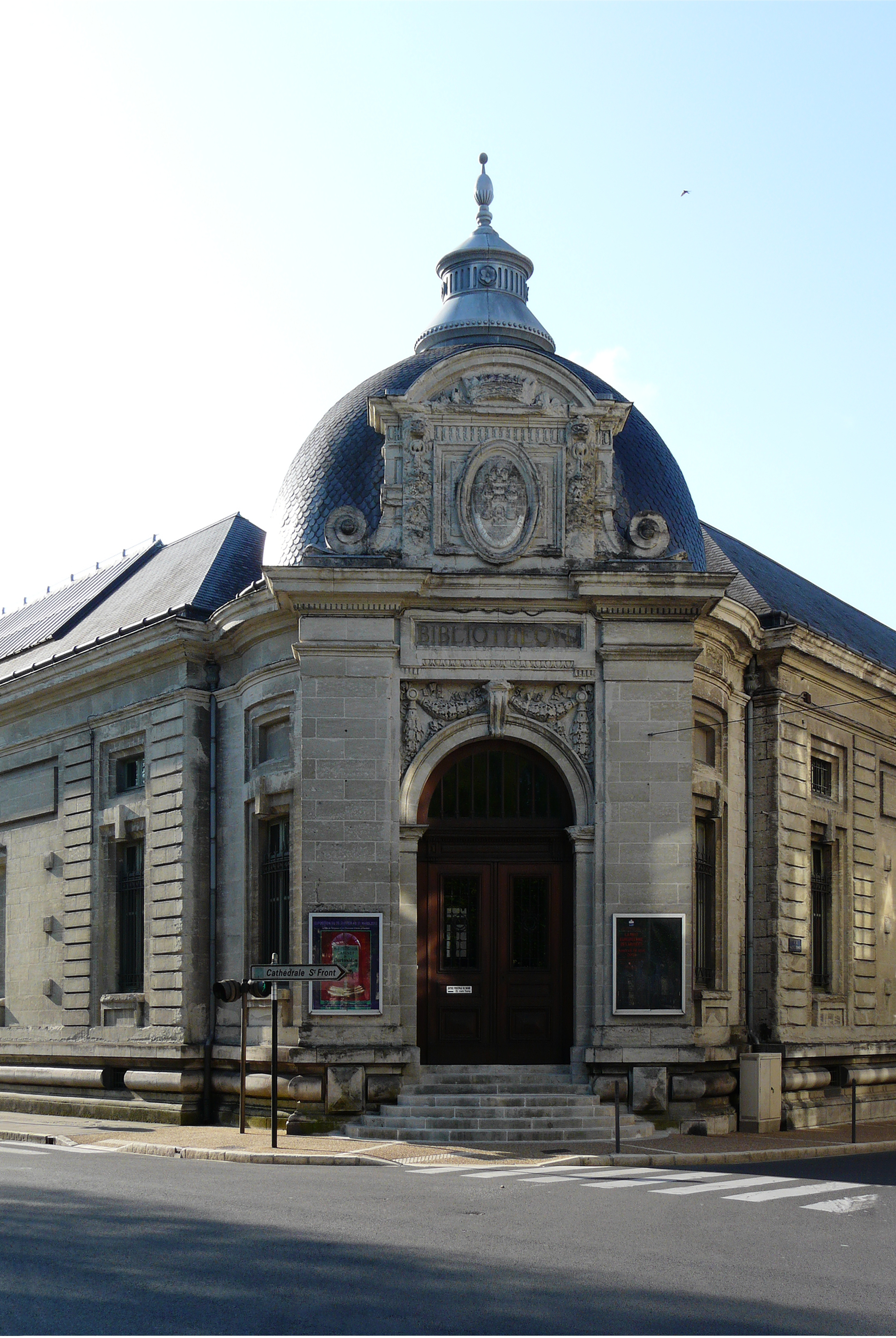 Le musée d'art et d'archéologie du Périgord, angle du cours Tourny et de la rue Saint-Front, Périgueux, Dordogne, France.